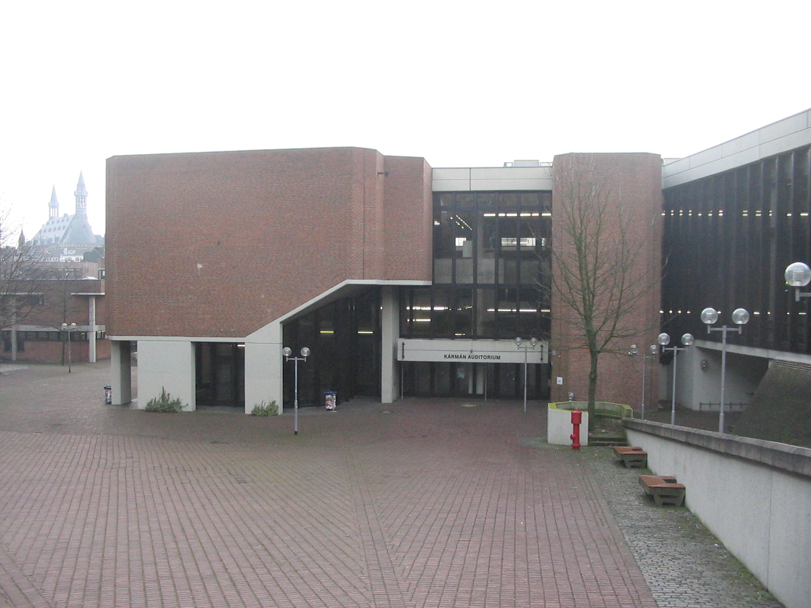 Karman-Auditorium der RWTH-Aachen, im Hintergrund ist das Dach des Aachener Rathauses zu sehen.